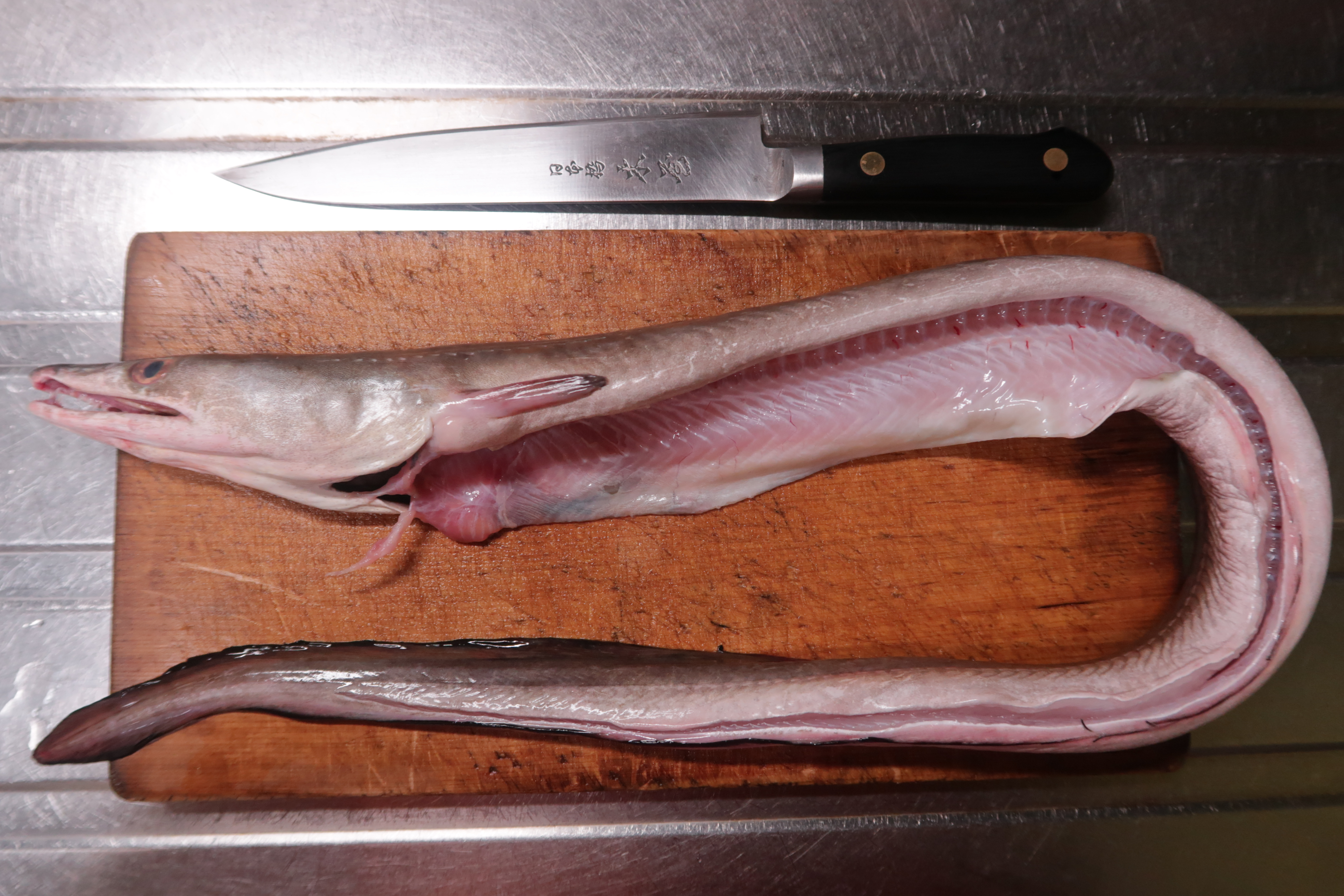 水洗いした鱧